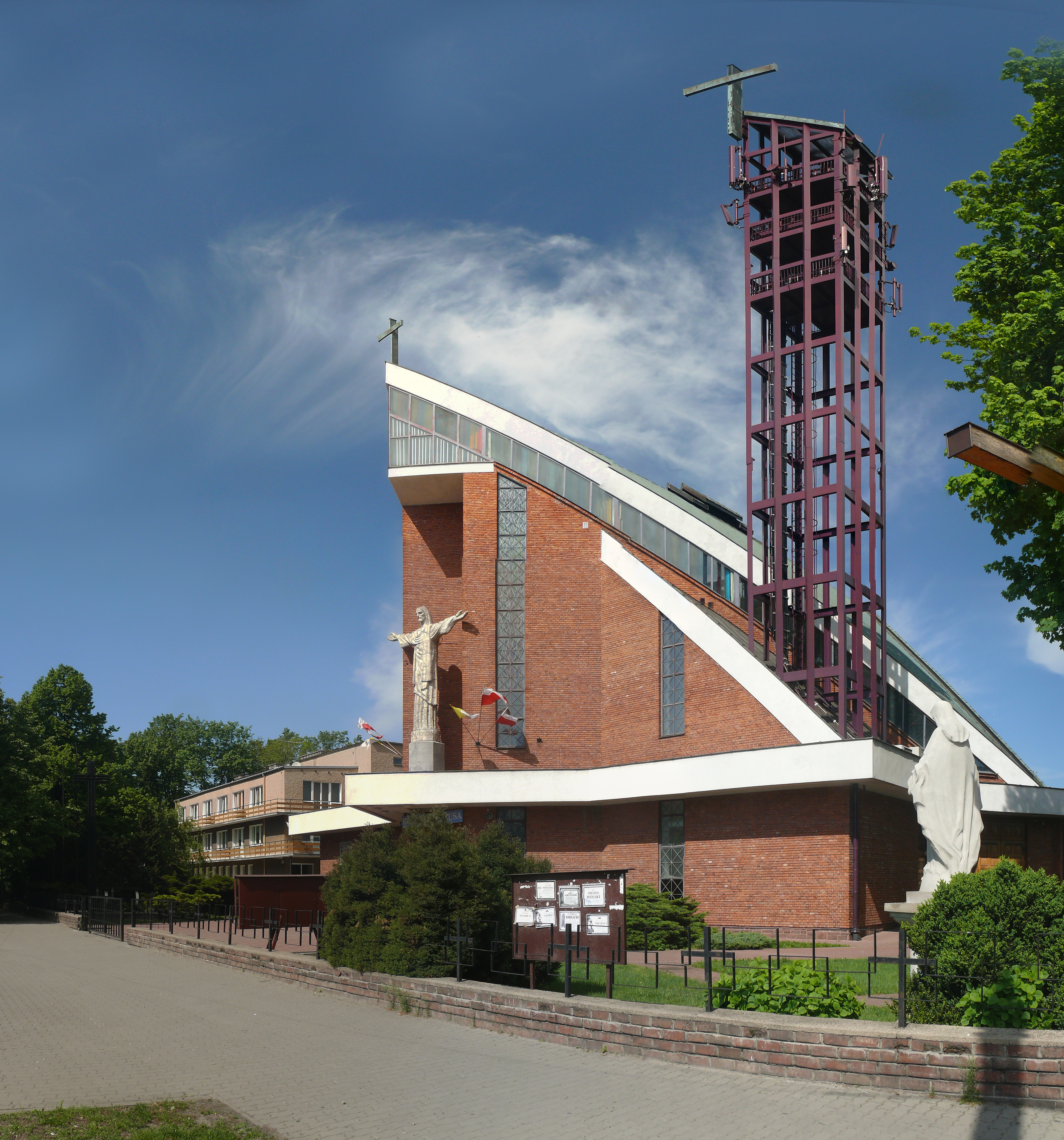 kościół p.w. Najświętszego Serca Jezusowego, przy ul. Kunickiego w Lublinie